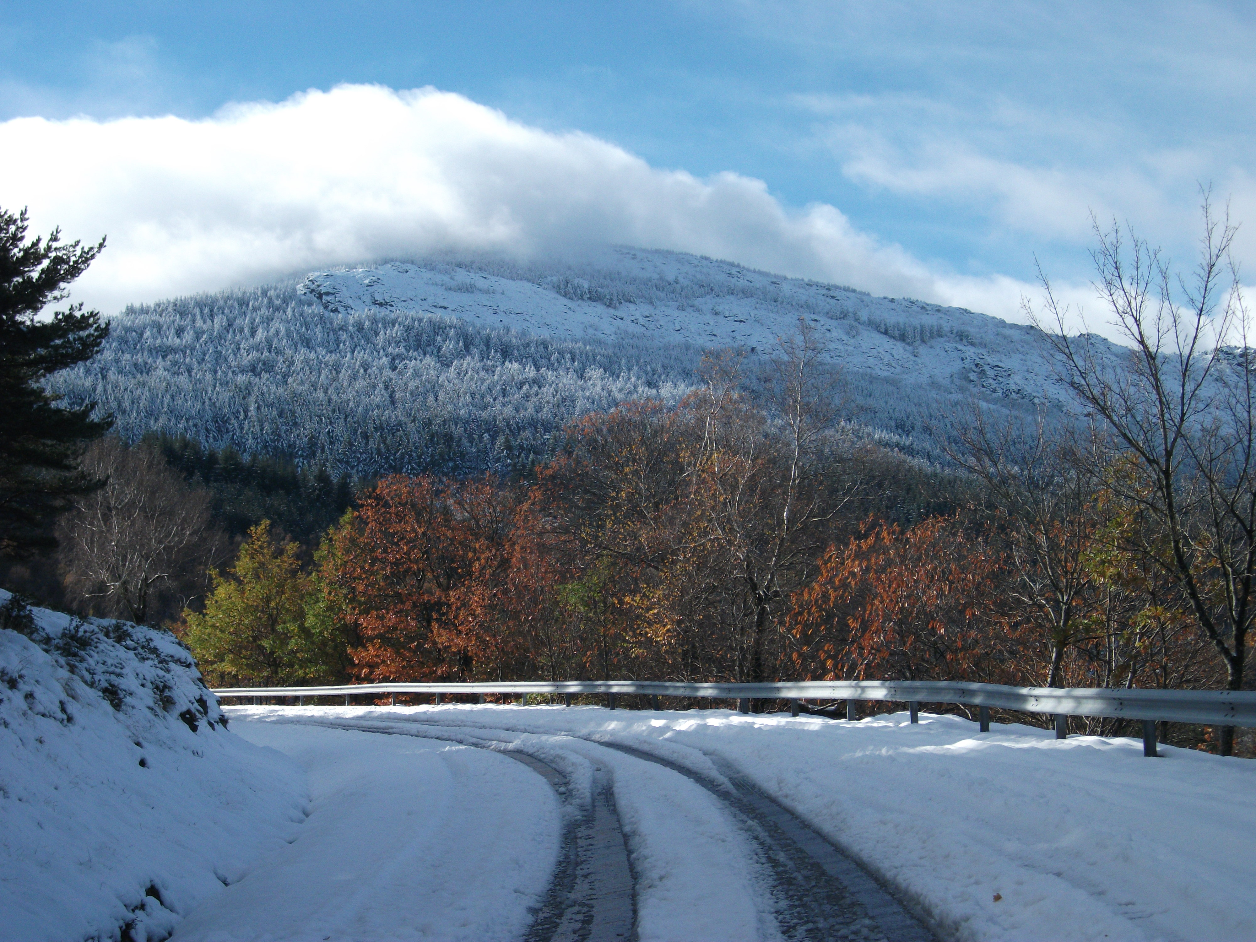 Neve na Serra do Marão (01-12-2010) Estrada Nacional n.º 15, algures entre a aldeia da Boavista e o Alto de Espinho, freguesia da Campeã, município de Vila Real This is a photography of a Site of Community Importance in Portugal with the ID: PTCON0003. Natura2000 entry, EEA entry